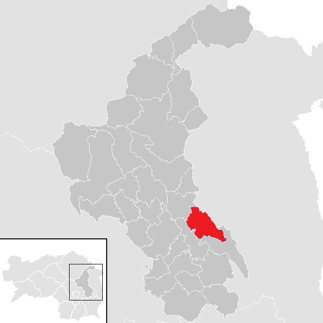 Lage von Pischelsdorf am Kulm im Bezirk Weiz